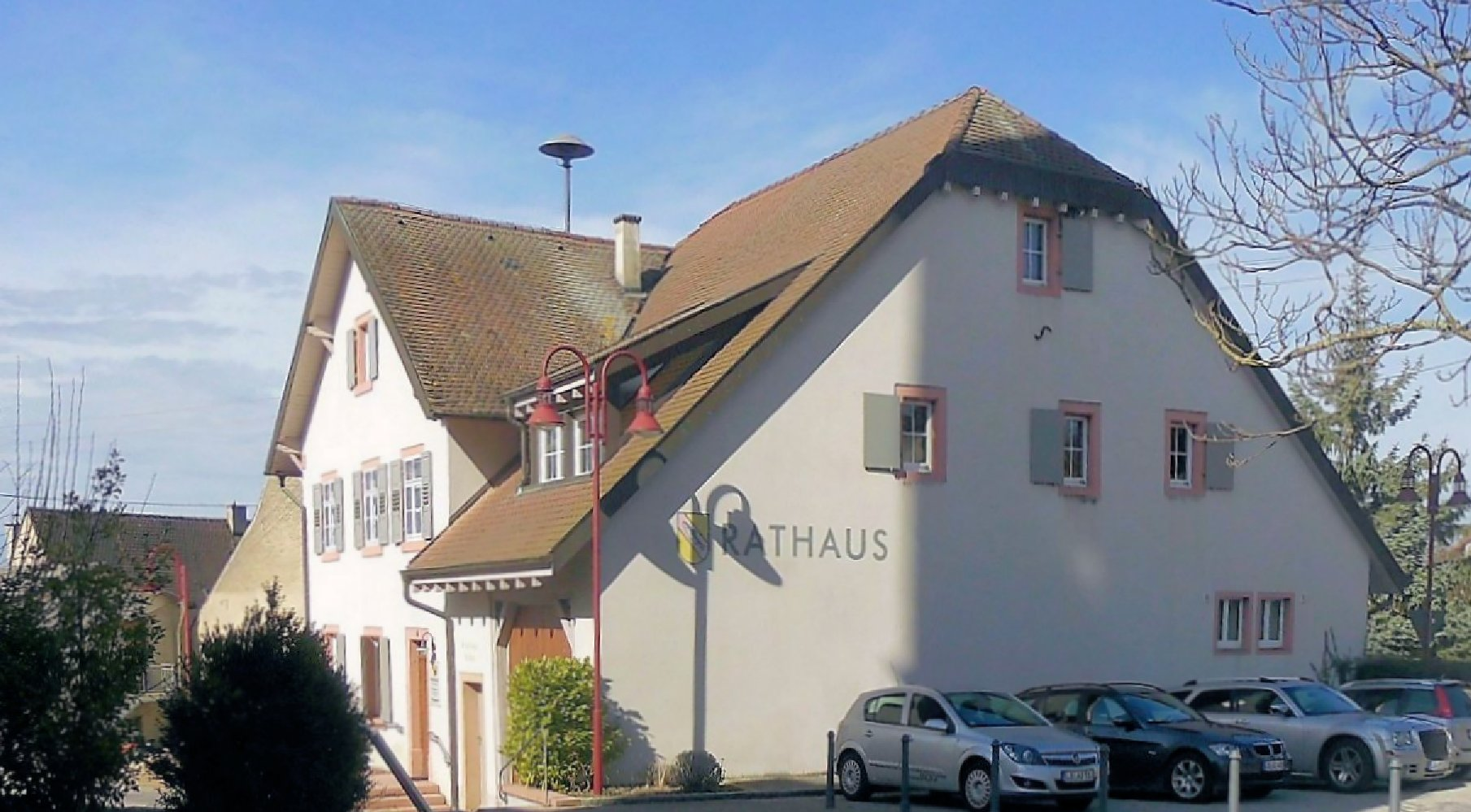 Rathaus der Gemeinde Fischingen, Landkreis Lörrach